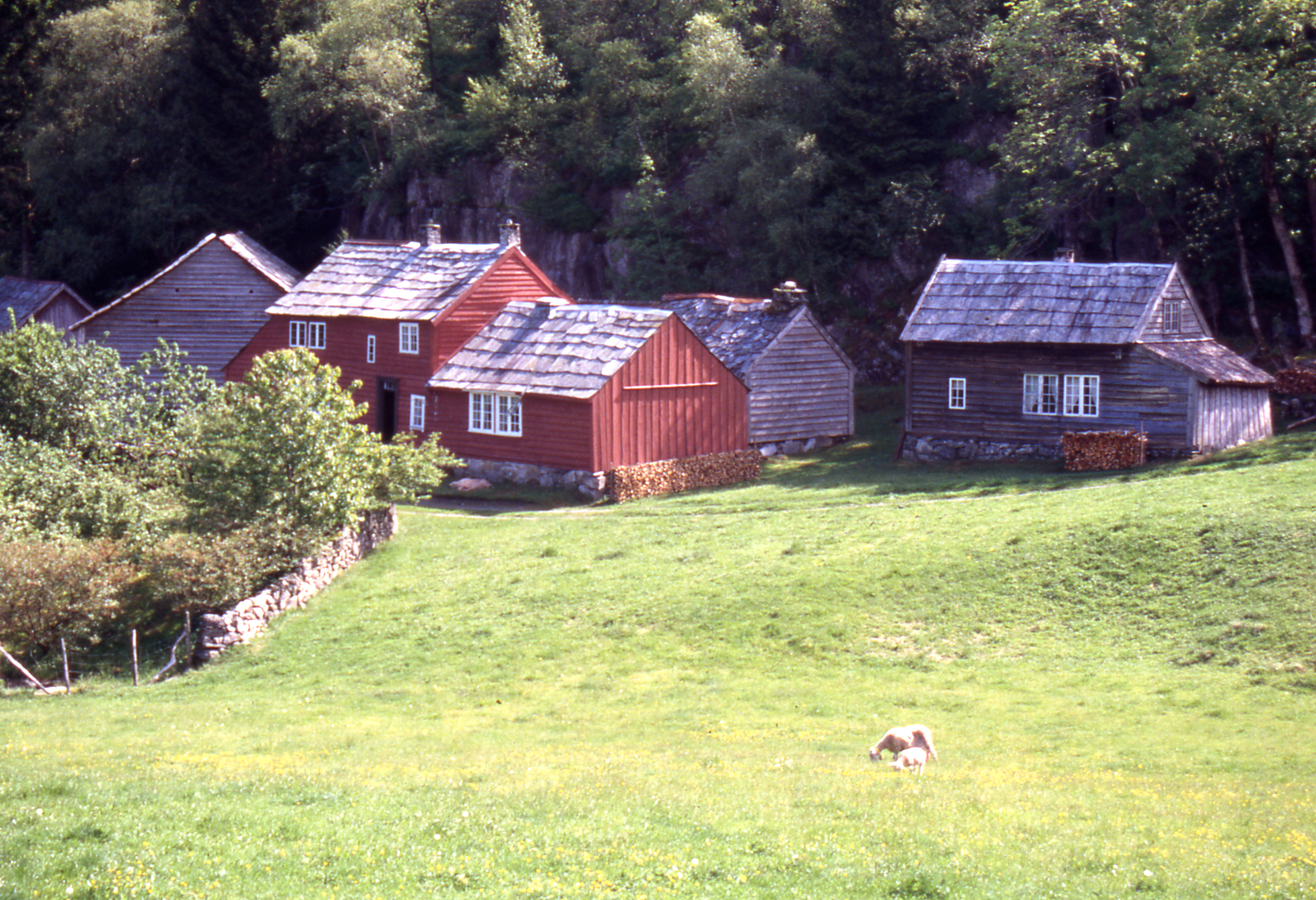 Norsk (nynorsk): Viga i Hjelmeland, avdeling av Ryfylkemuseet